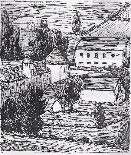 gravure du chateau de sirot